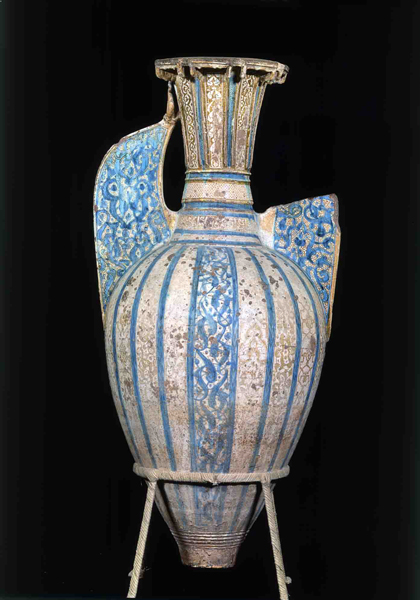 Jarrones de la Alhambra (Reino Nazarí de Granada). Número de inventario: 50419.